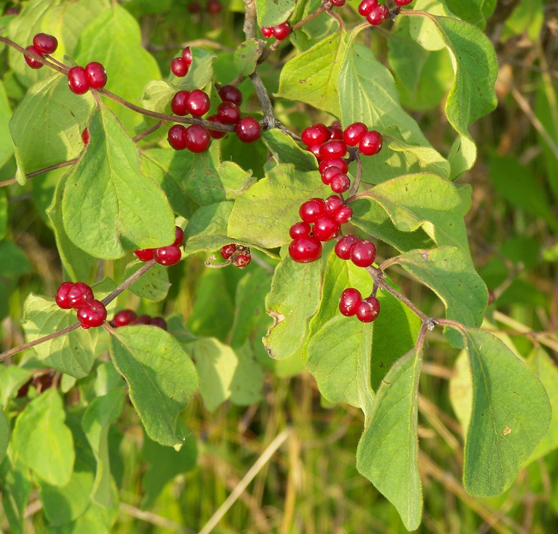 Baies de chèvrefeuille des haies, sud de l’Allemagne.